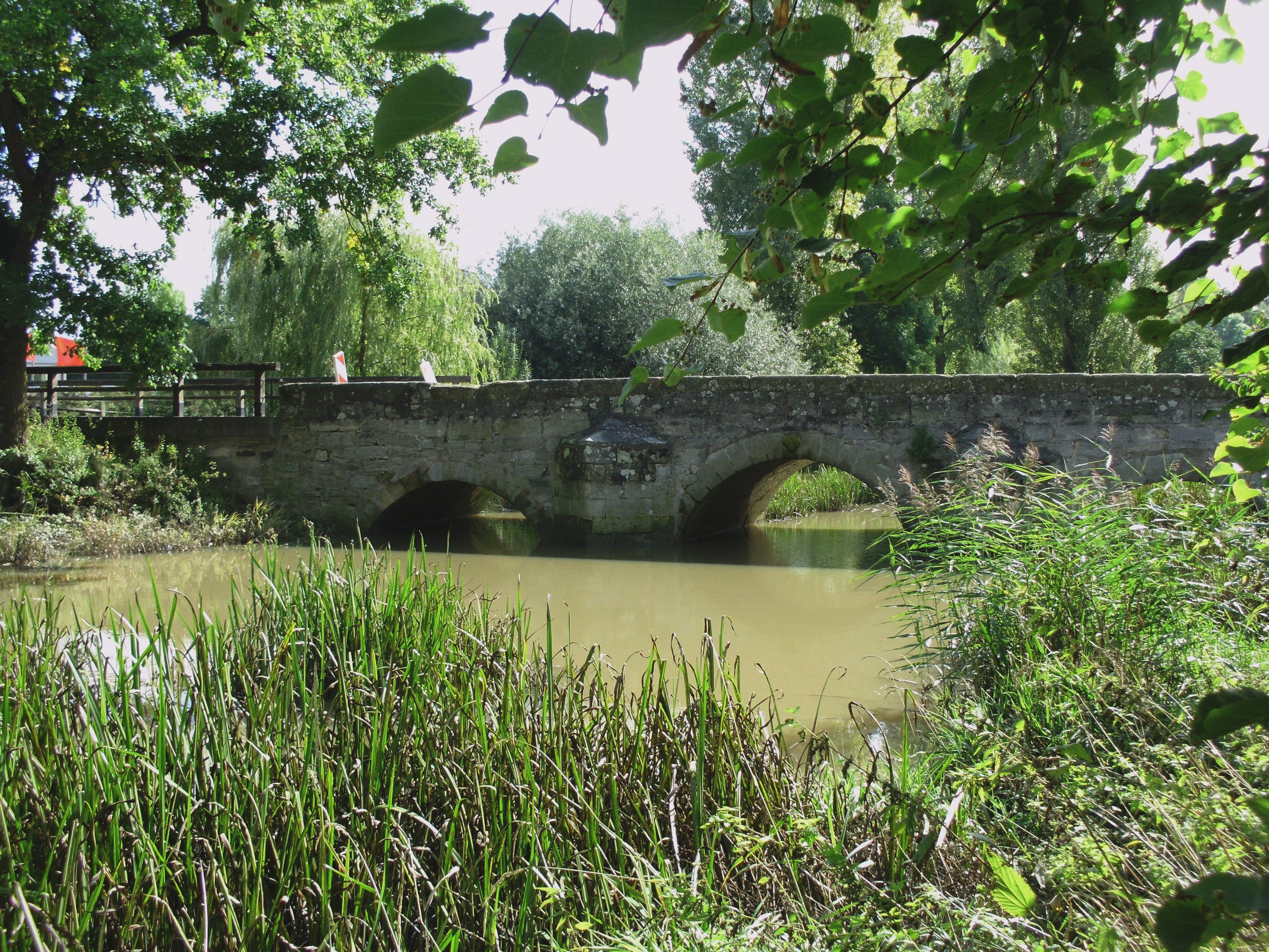 Frommetsfelden, Ortsteil von Leutershausen im mittelfränkischen Landkreis Ansbach, Altmühlbrücke